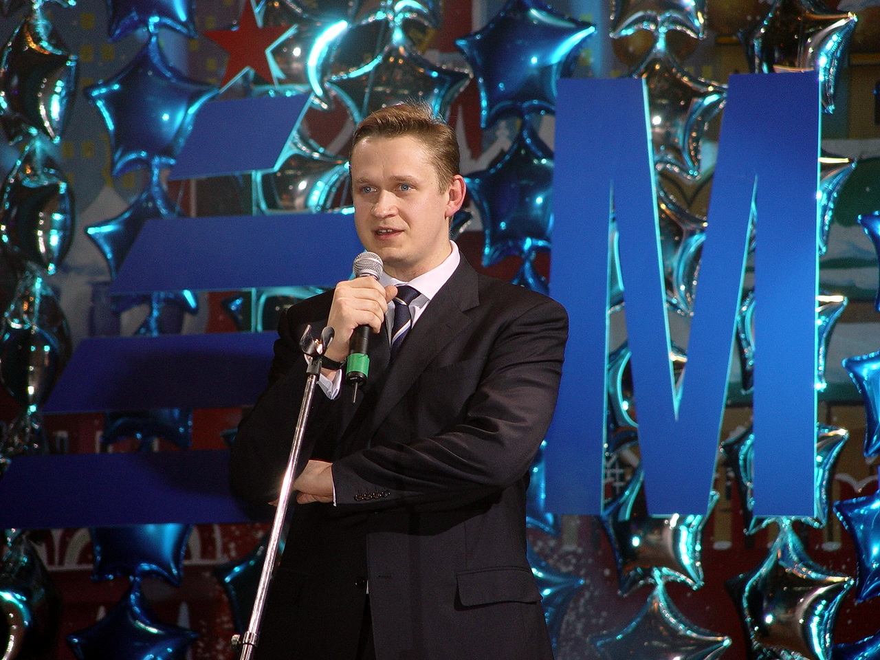 Владимир Валерьевич Рашевский - руководитель МДМ-Банка, 2003 г.